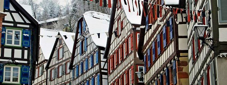 Altstadt von Schiltach im Winter